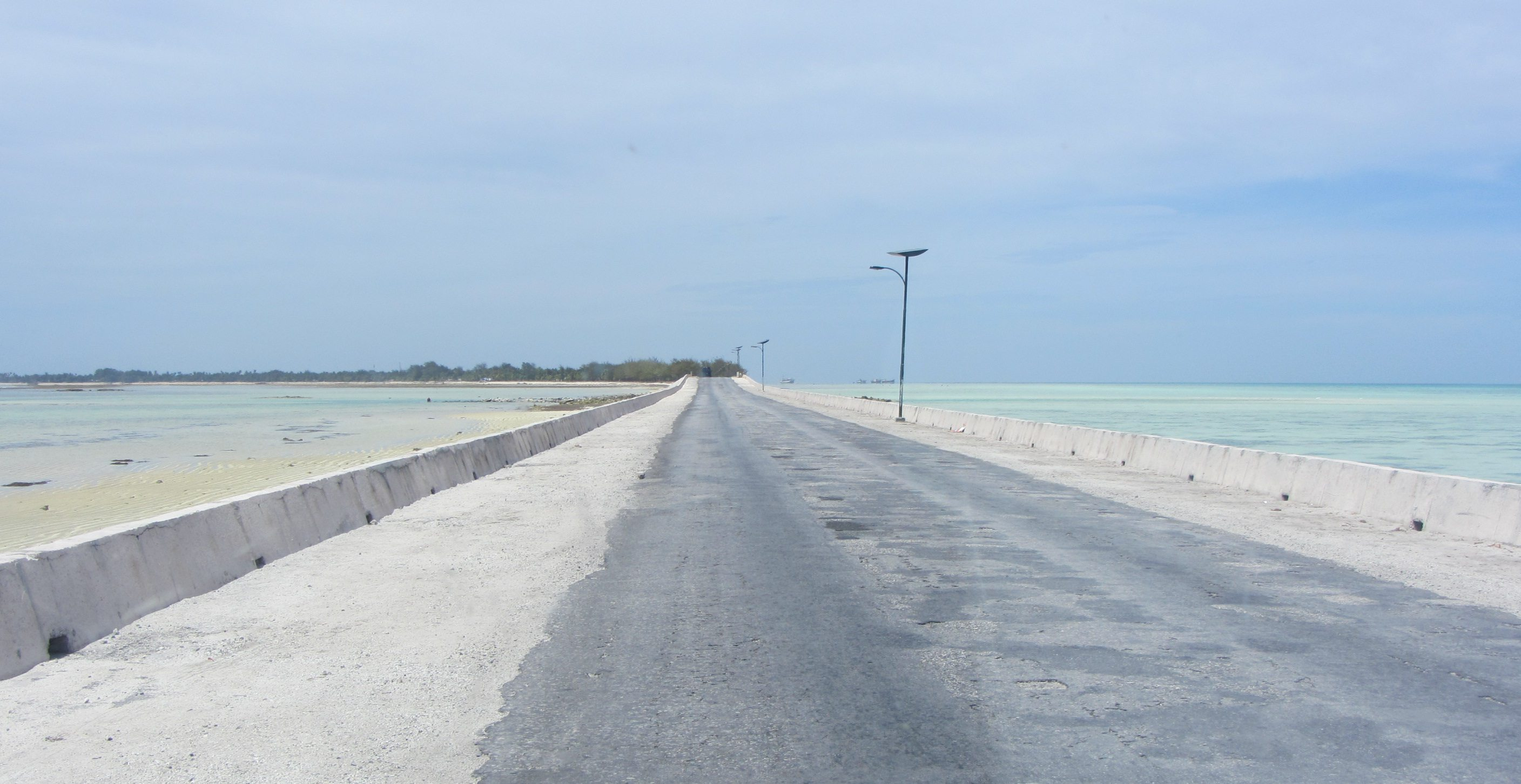 der Bairiki-Betio Straßendamm in South Tarawa, erstellt von Dai Nippon